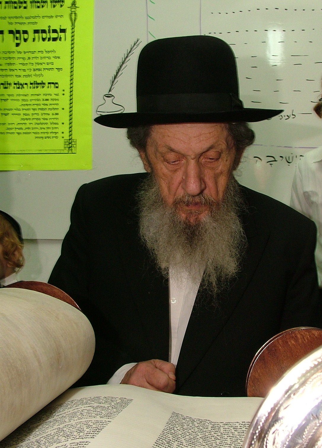 הרב דב לנדו